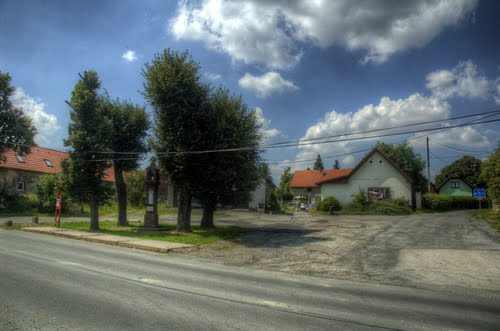 Srbín 2010 náves